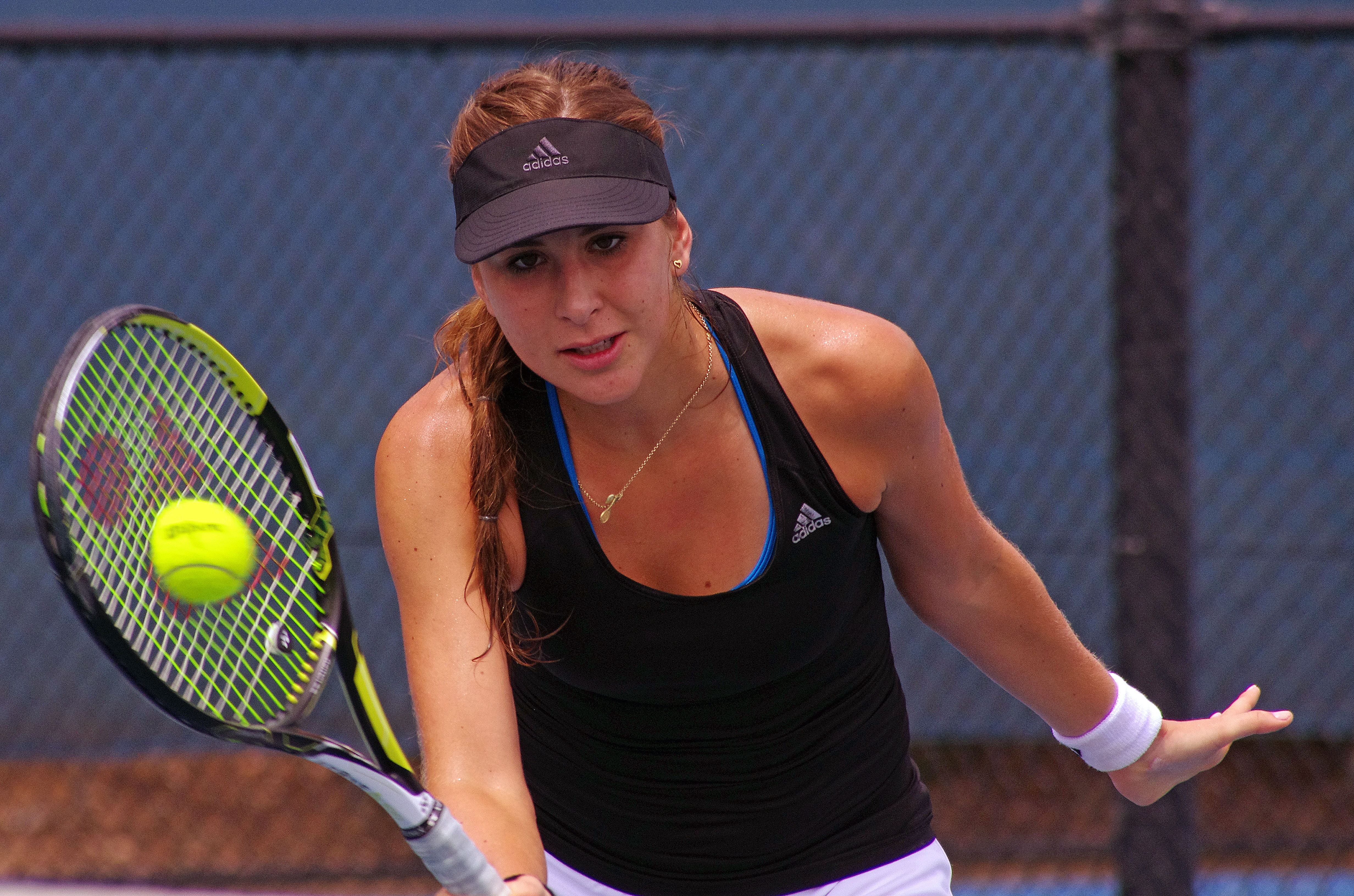 BELINDA BENCIC